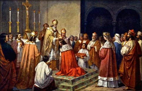 Josef Mathauser - Opat Božetěch dává korunu králi Vratislavovi